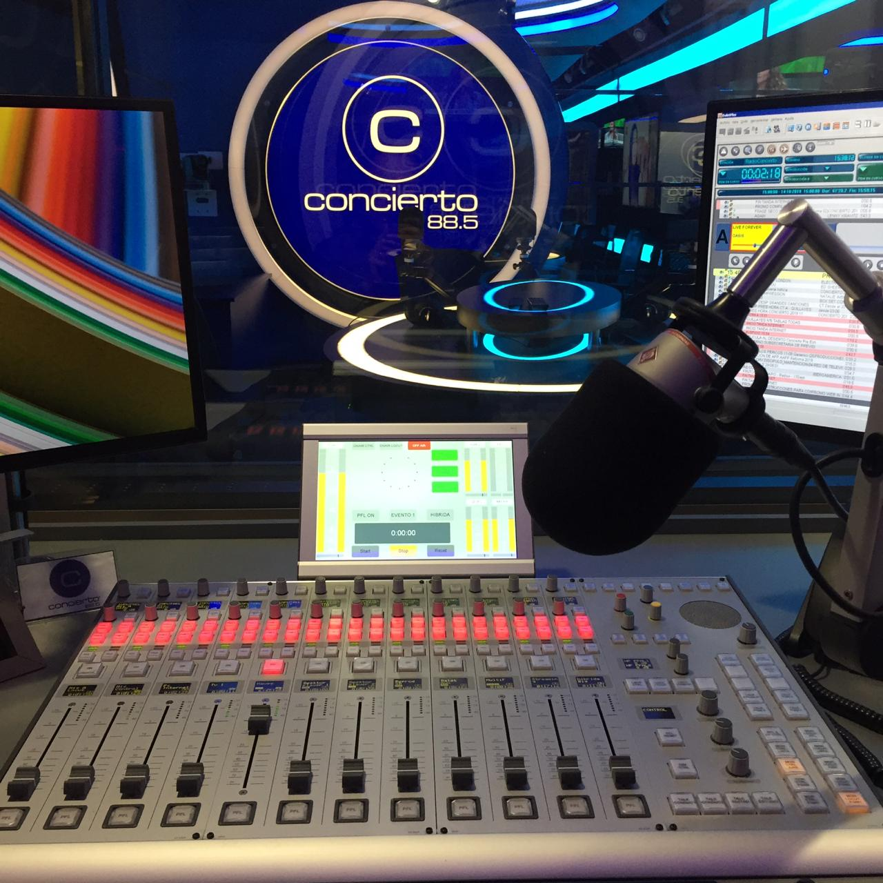 Fotografía de los Estudios de Radio concierto